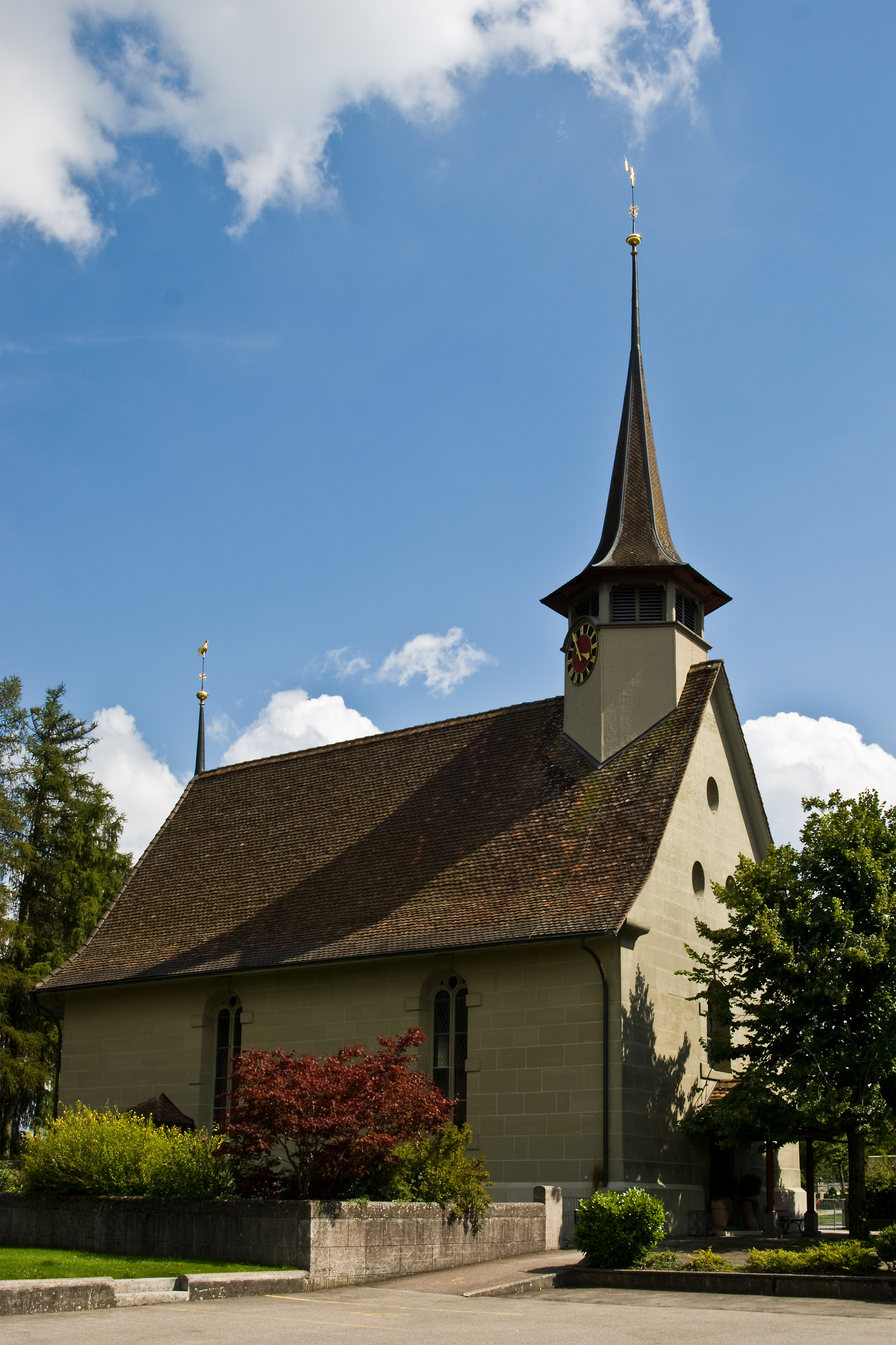 Reformierte Kirche Bätterkinden, Kt. Bern